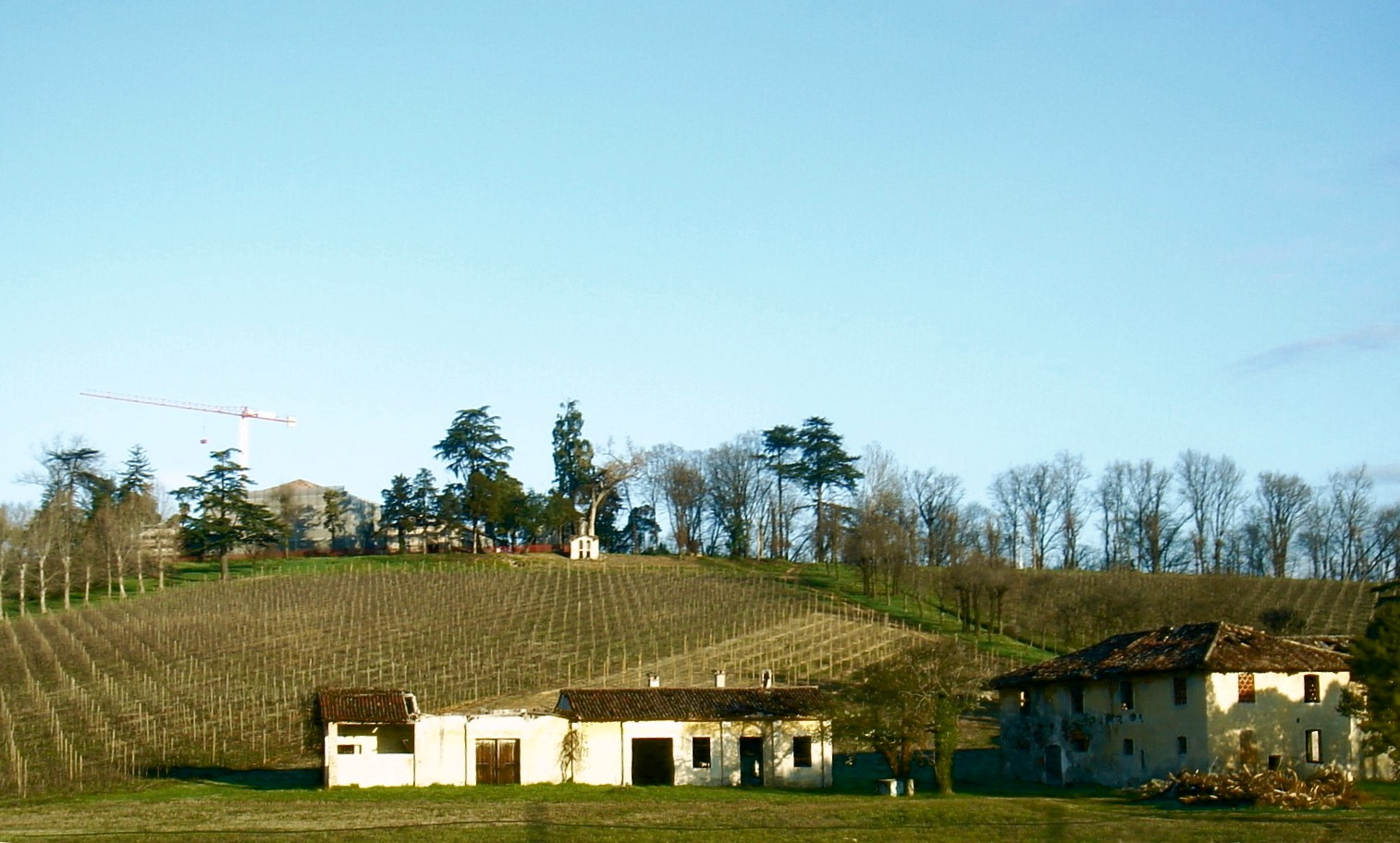 San Vendemiano, Treviso, Italia: l'area di Villa Lippomano in località Monticella. La villa e le barchesse sono in alto a sinistra, durante il restauro degli anni 2000; in basso le case rurali della tenuta, in stato di profondo degrado.